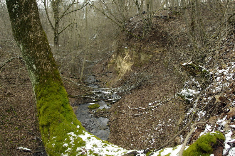 Orasoja kanjon.